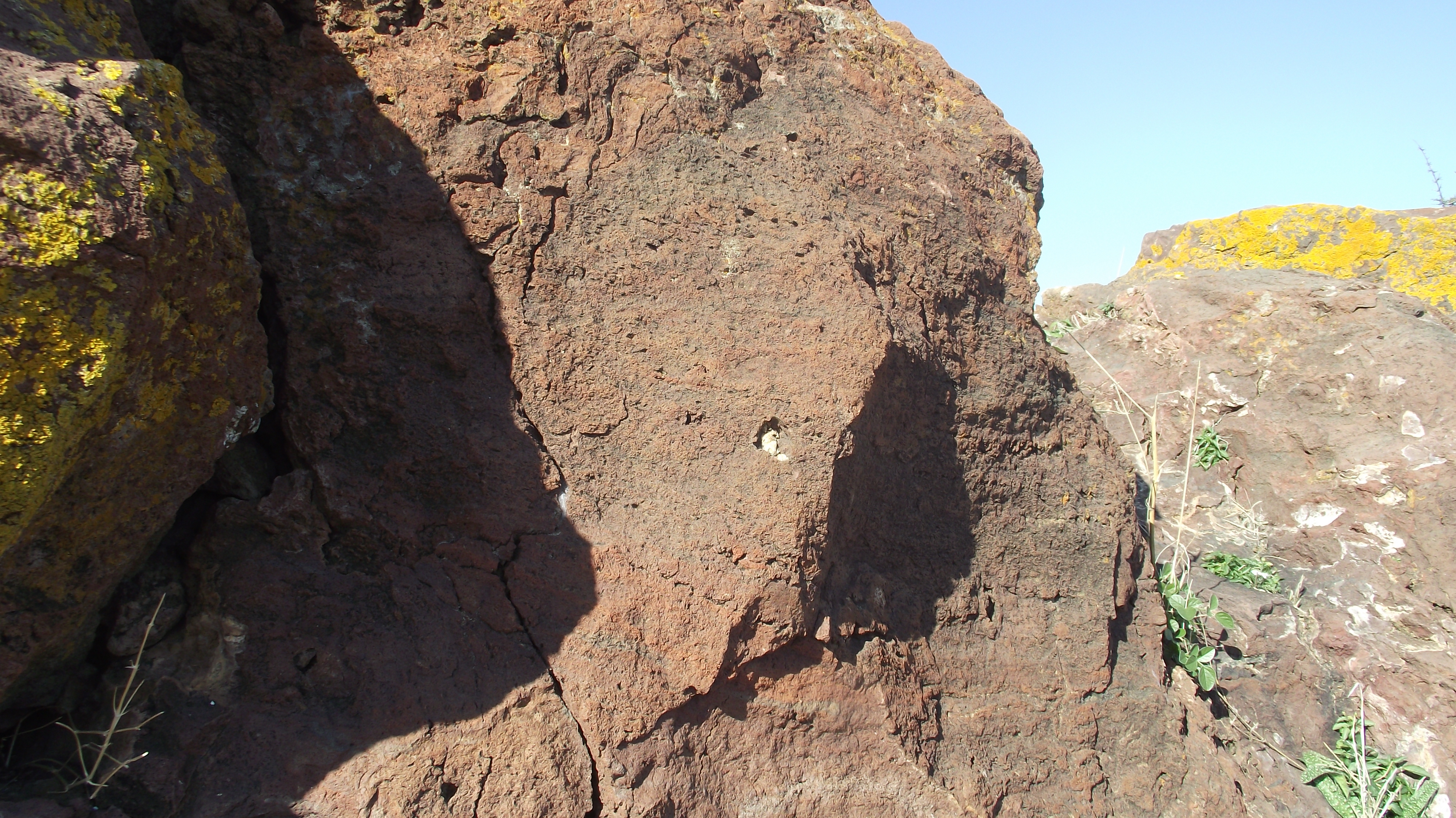 Detalle de la cima del volcán de Barqueros - Murcia - España